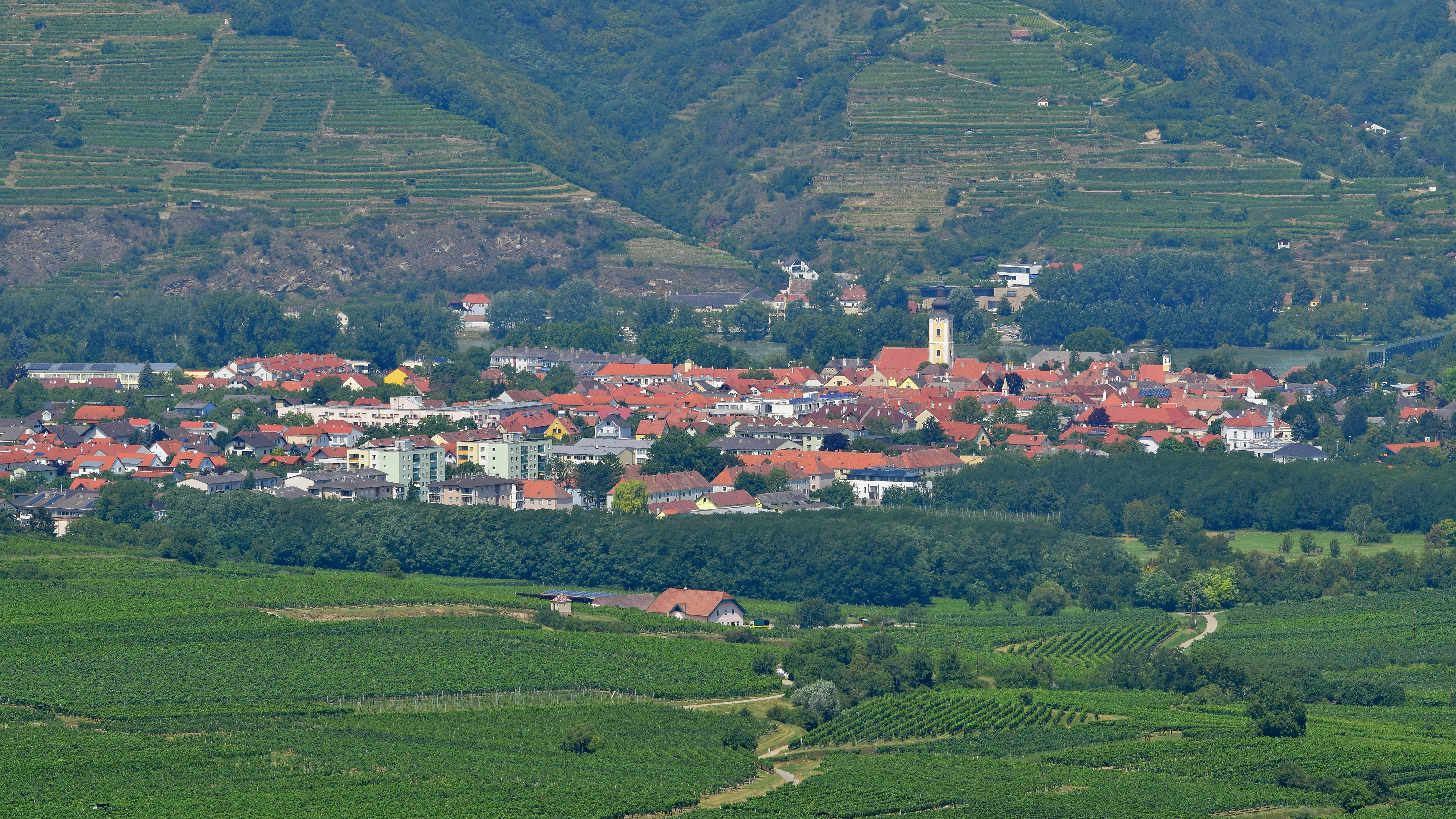 Mautern an der Donau, aufgenommen vom Stift Göttweig.